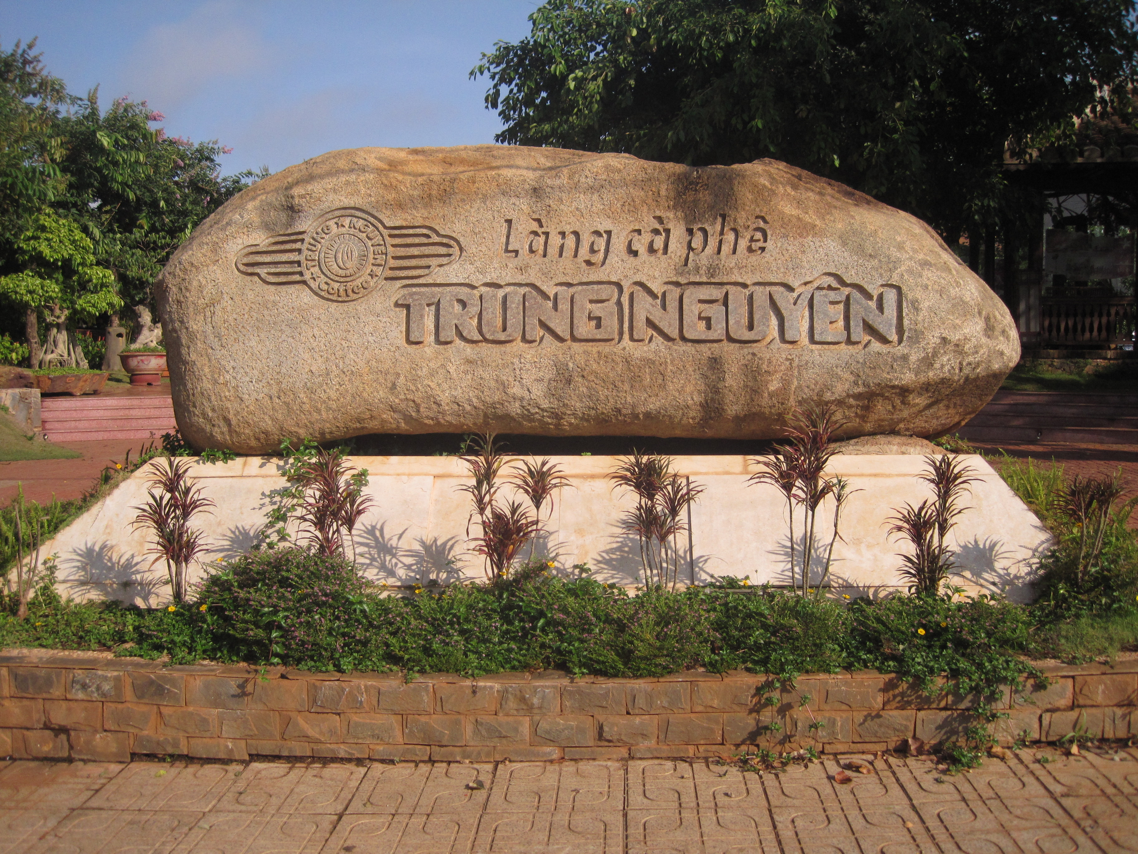 Lang ca phe